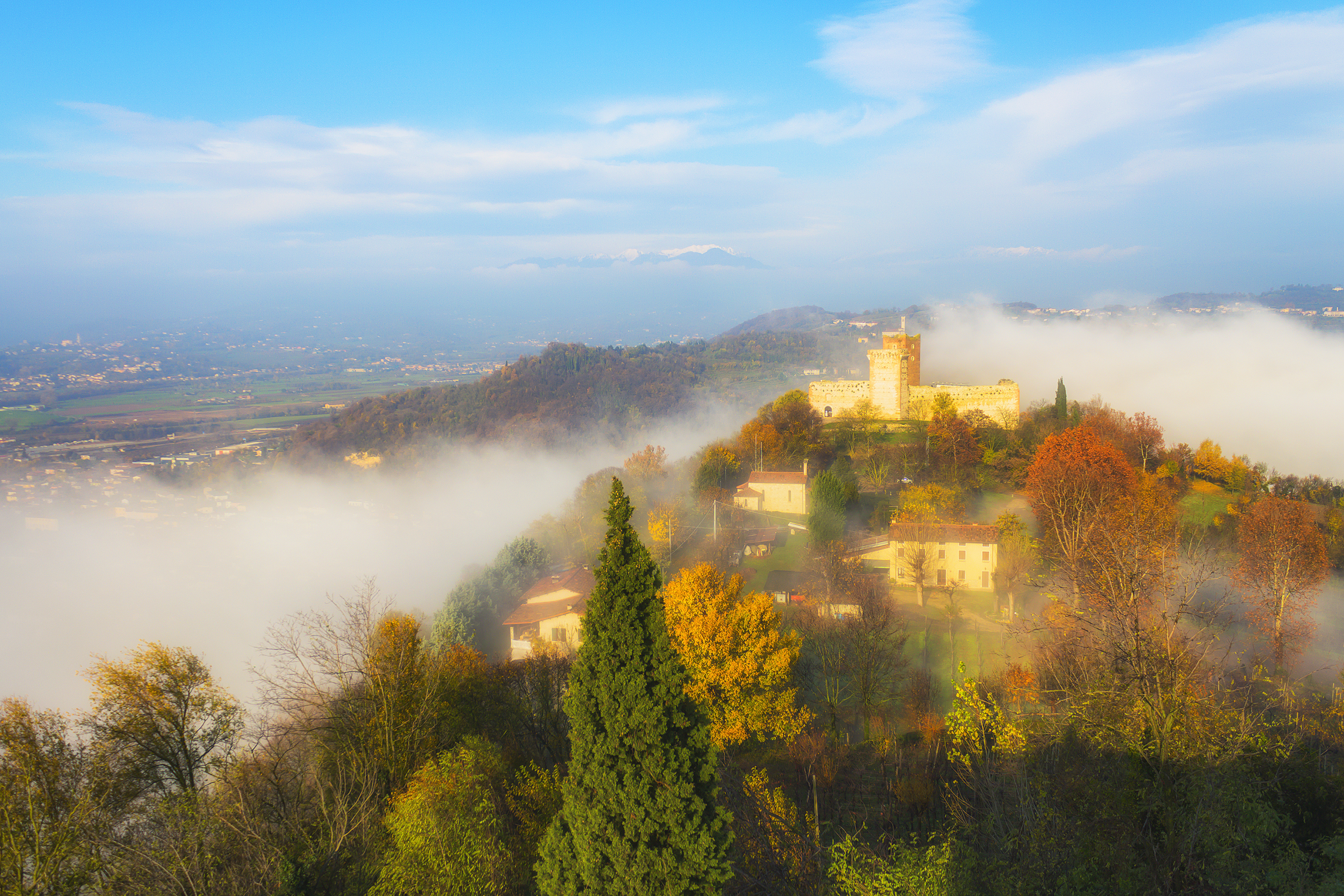 Colli Berici (Q49963333)